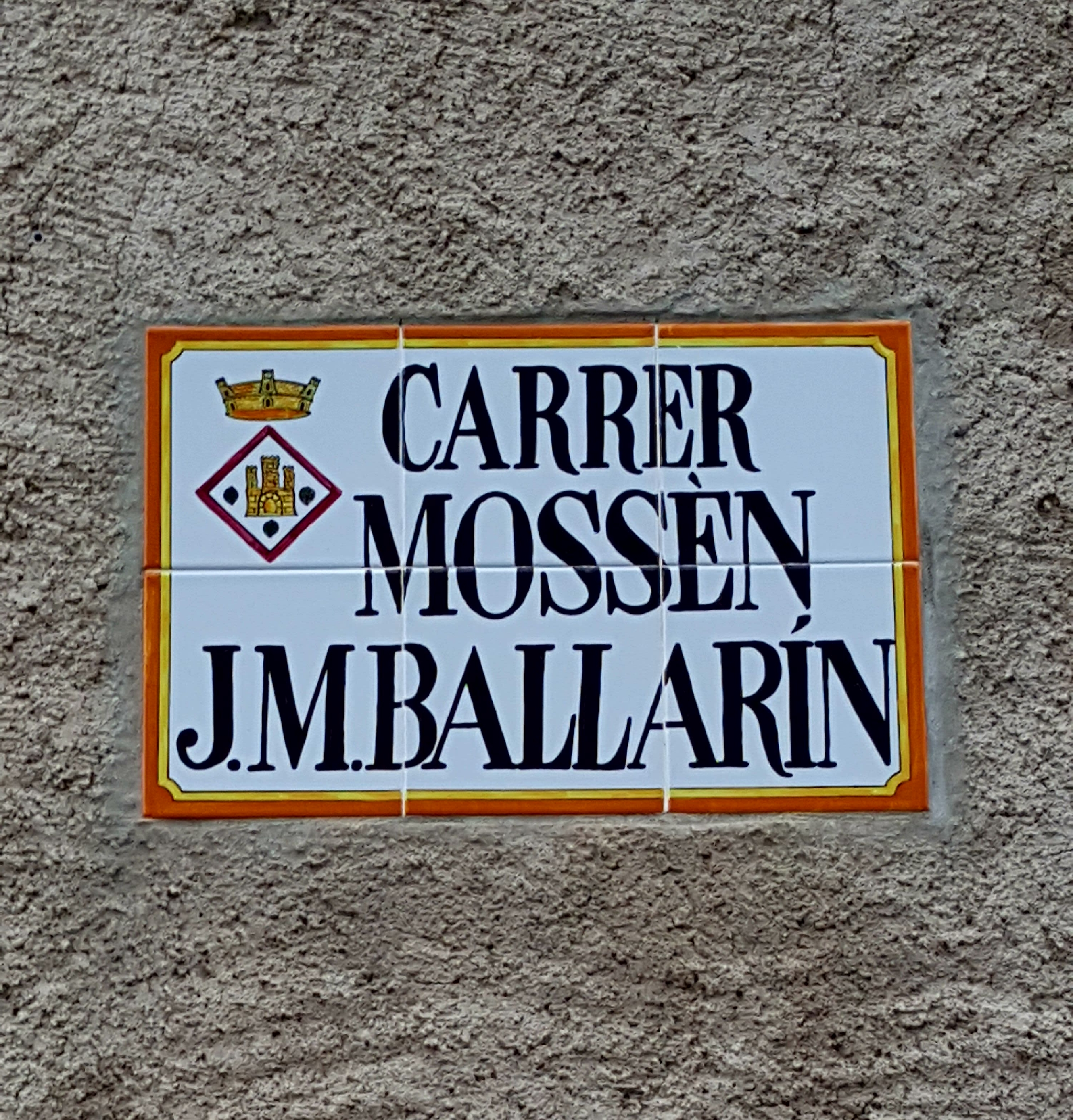 Placa del carrer destinat a J.M. Ballarín a Gòsol